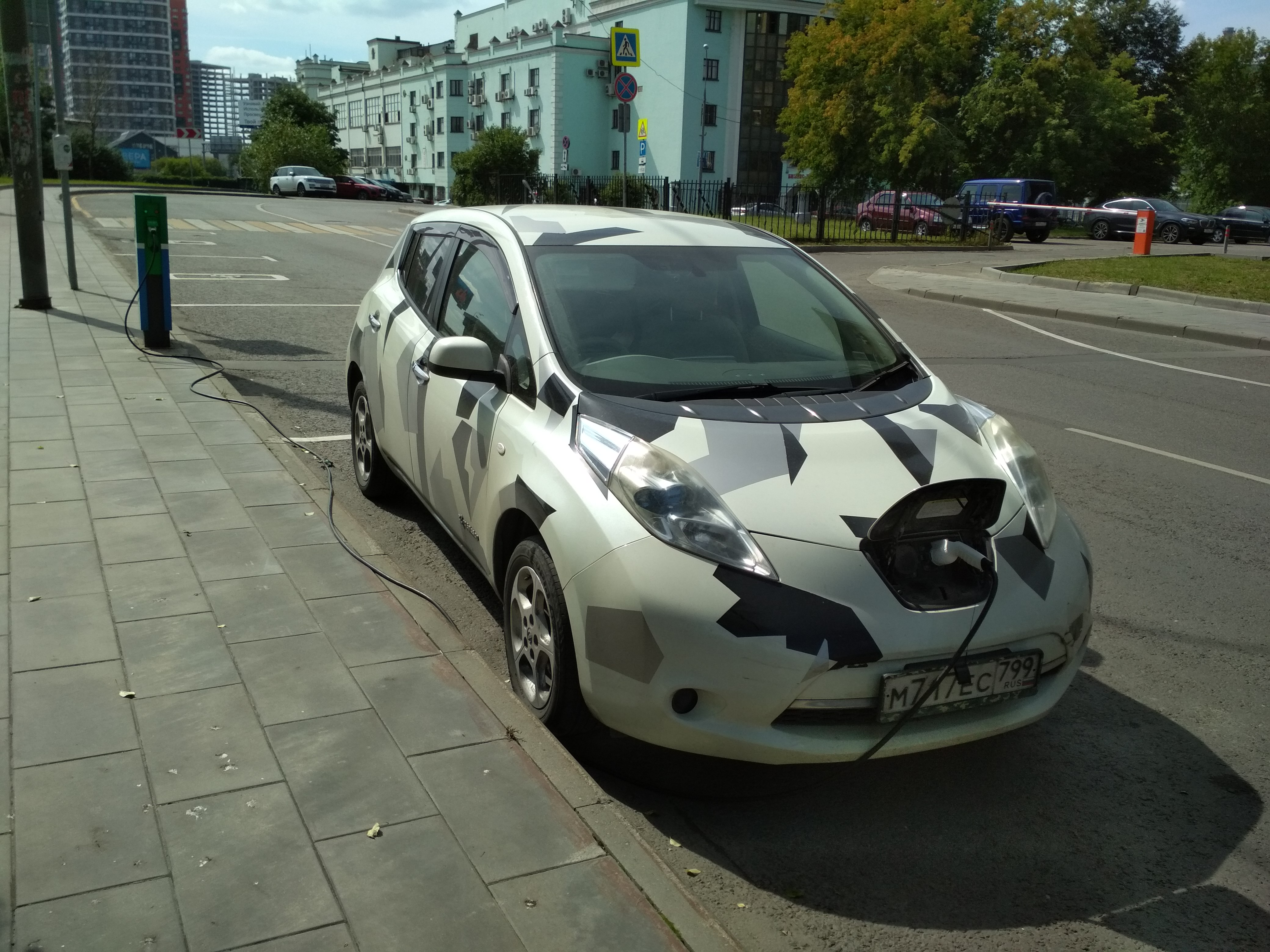 Электромобиль (Ниссан, кажется) на подзарядке